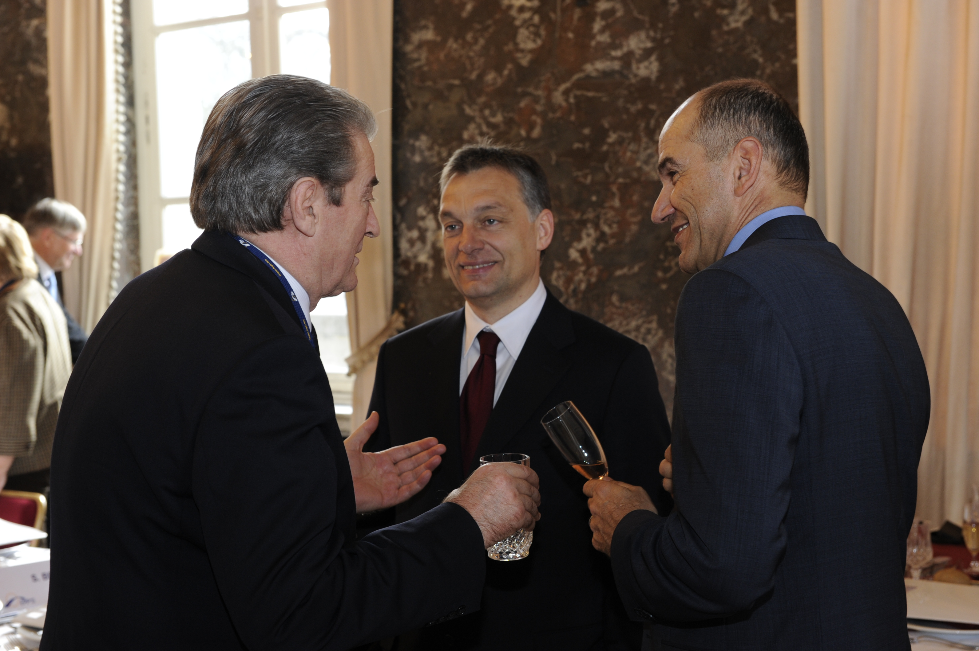 EPP Summit March 2010